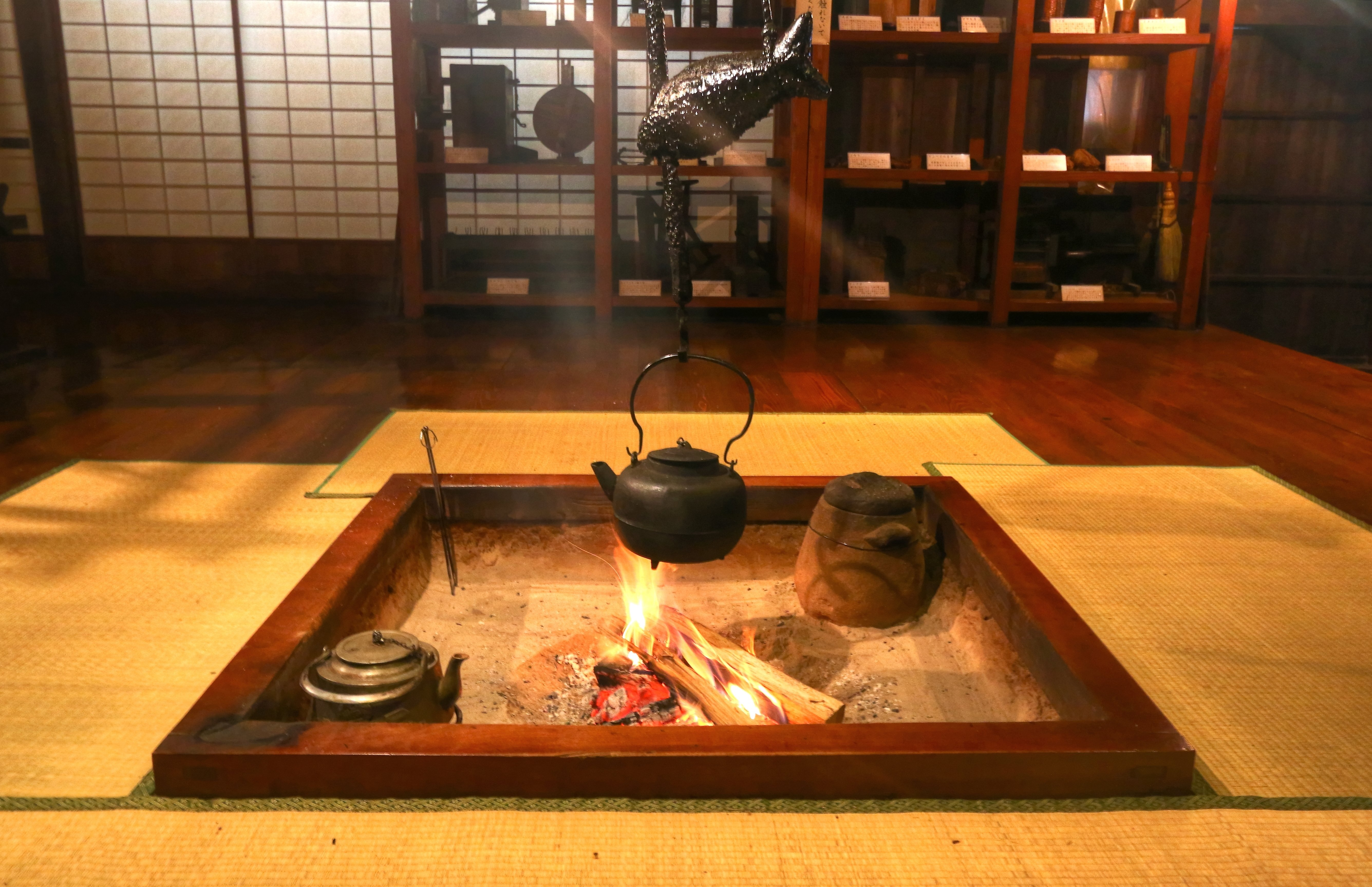 日本家屋、囲炉裏